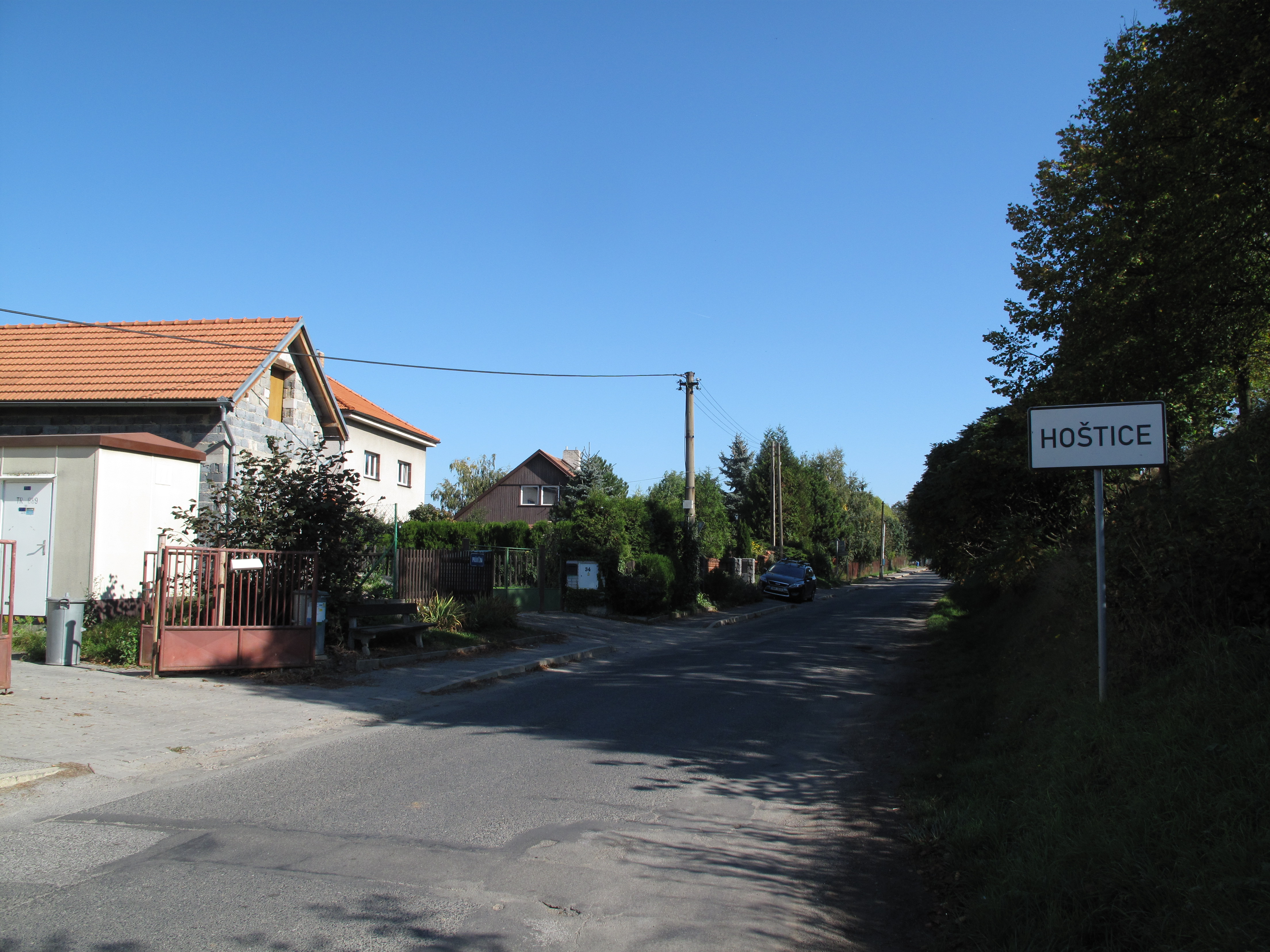 Česky: Hoštice